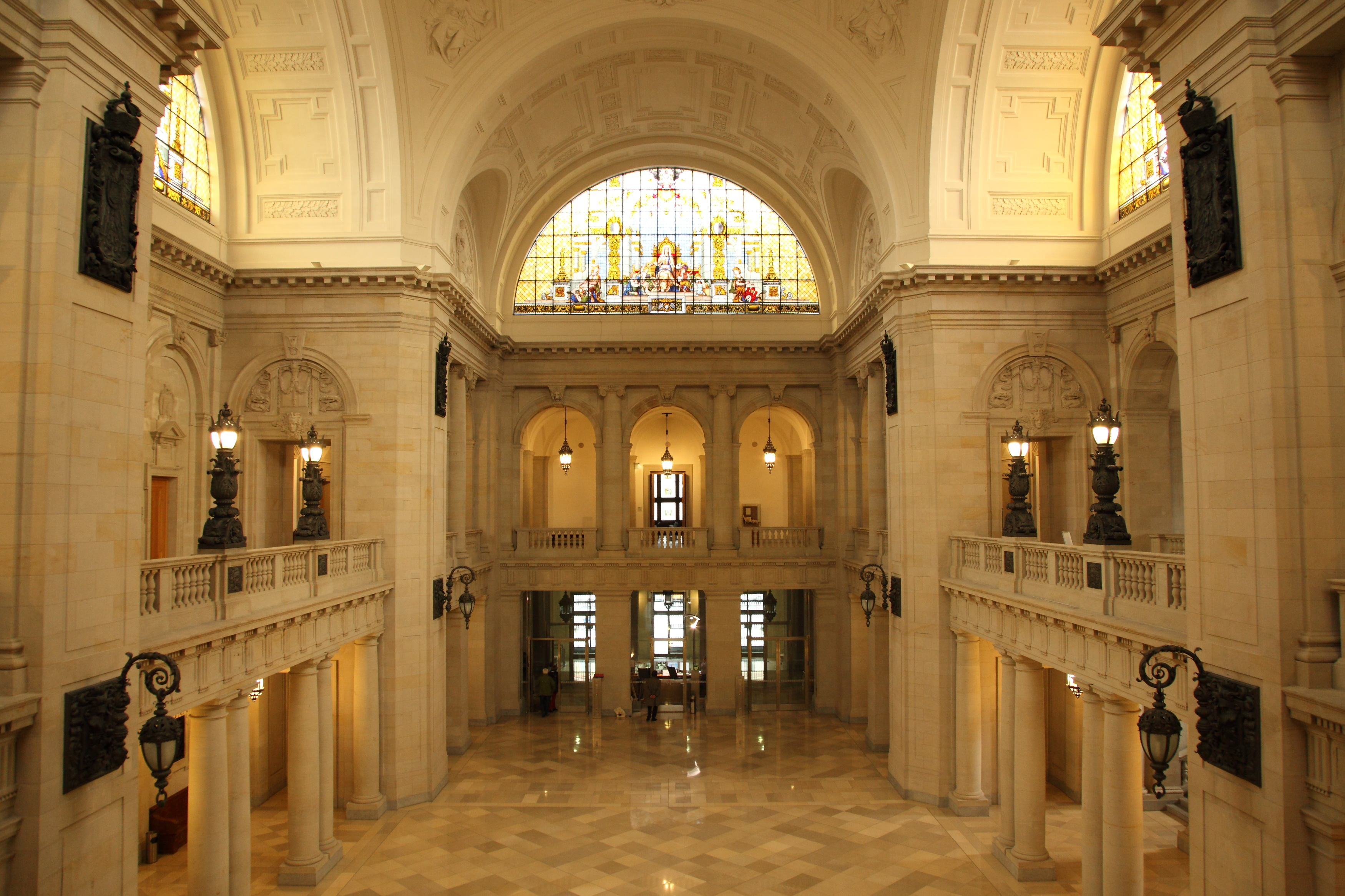 Bundesverwaltungsgericht Leipzig Innenraum